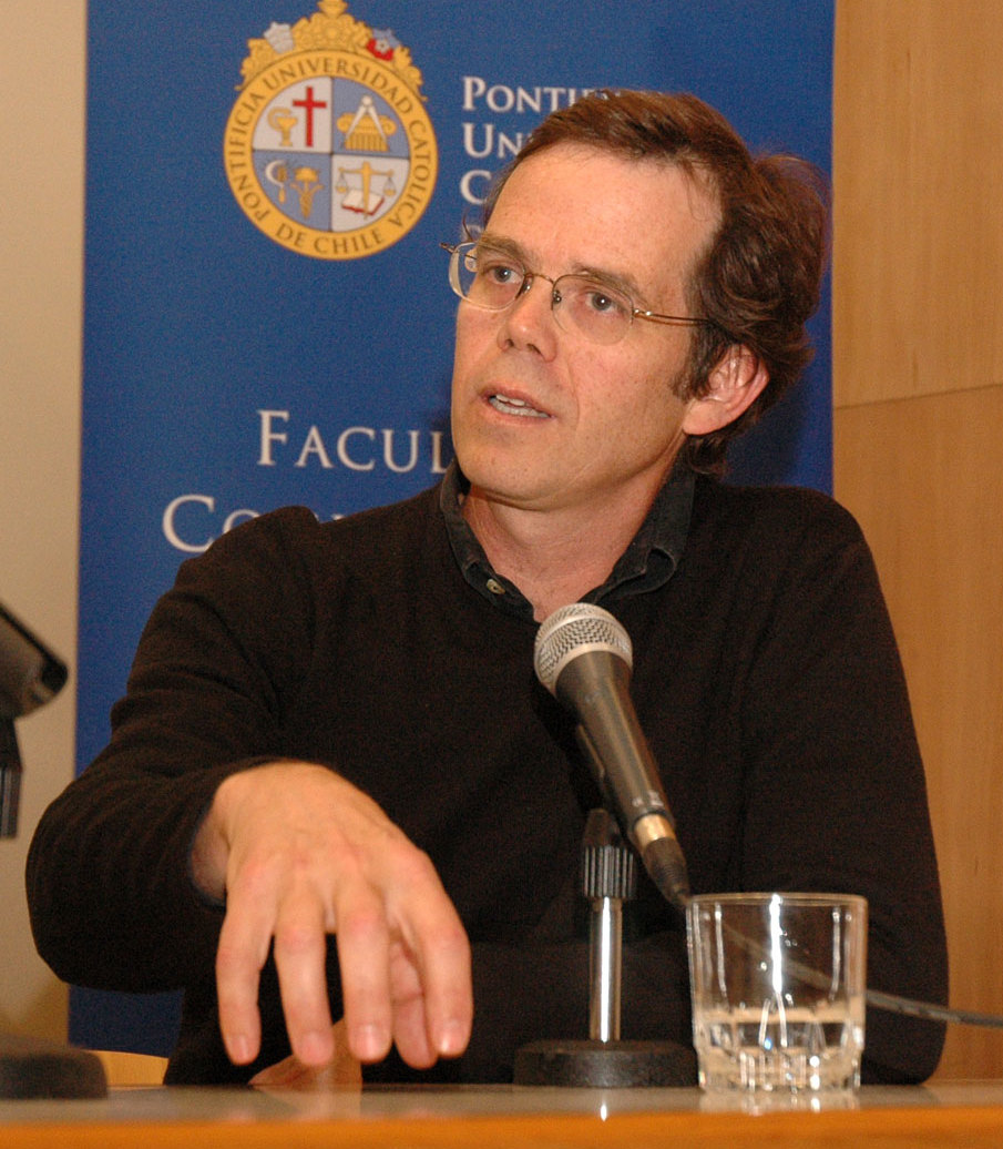 Andrés Wood Montt (* Concepción 1965) es un director de cine chileno. El director realizó una charla académica en la Facultad de Comunicaciones de la Pontificia Universidad Católica de Chile.